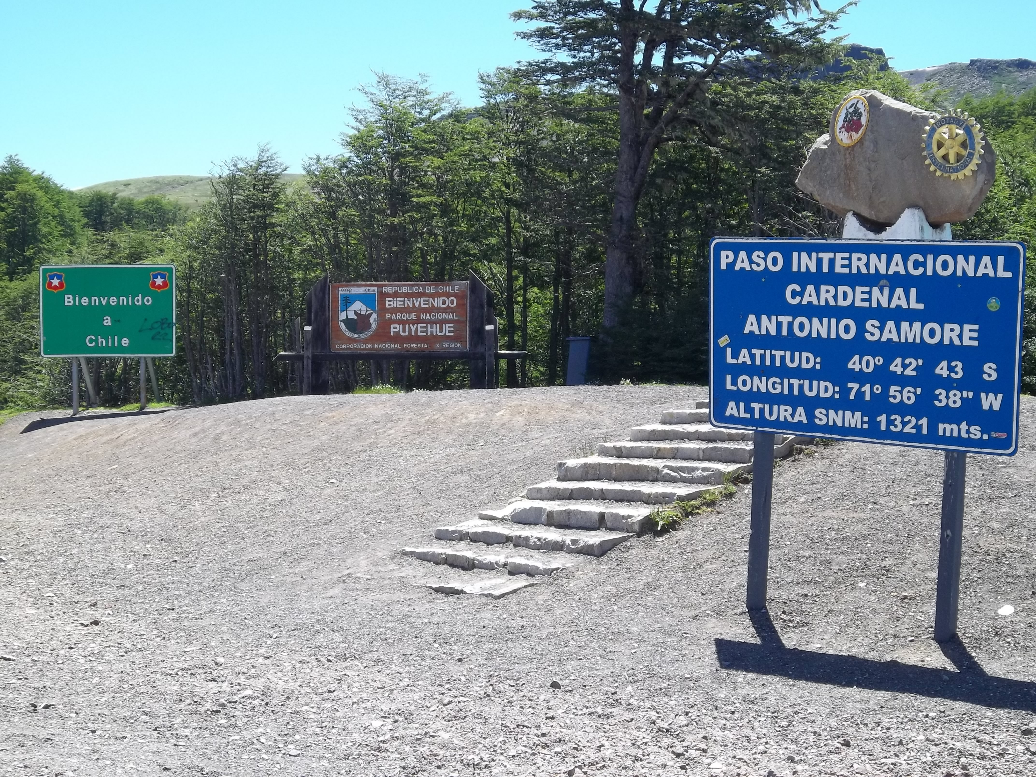 Paso Cardenal Samoré en el límite internacional Argentina-Chile.